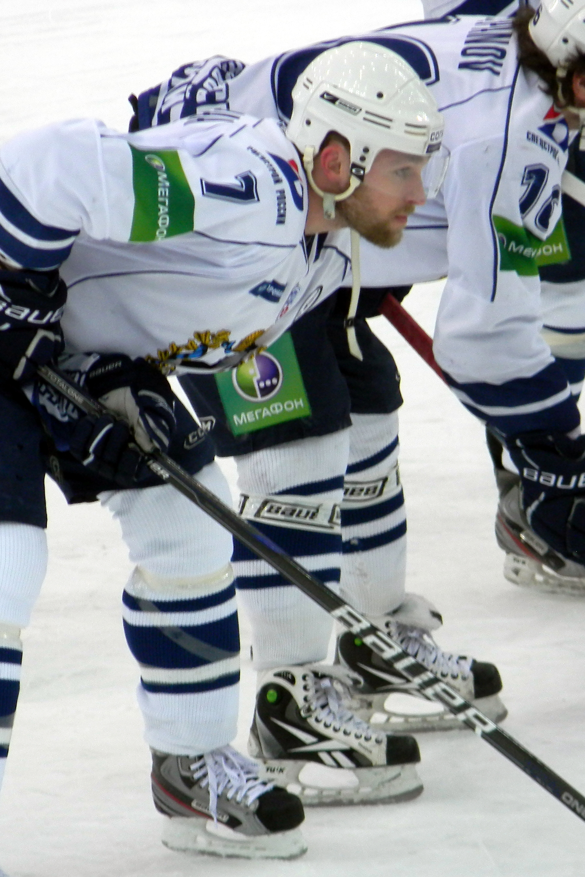 Mikko Mäenpää, an ice hockey player from Amur Khabarovsk